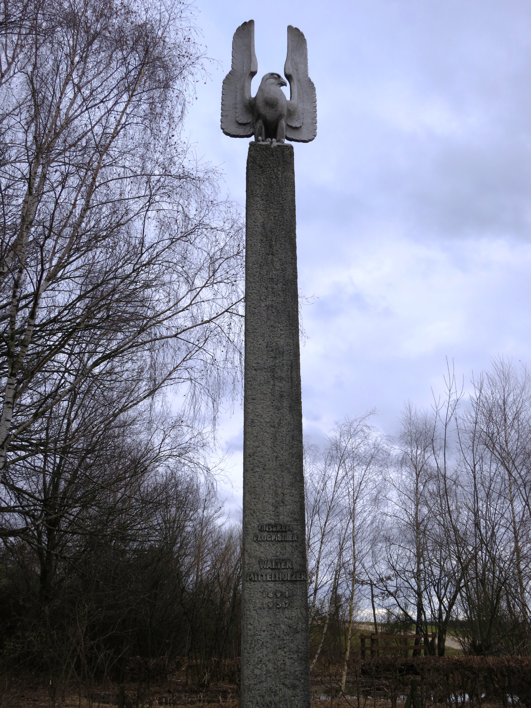 Mittelholzerdenkmal, Kloten ZH, Schweiz